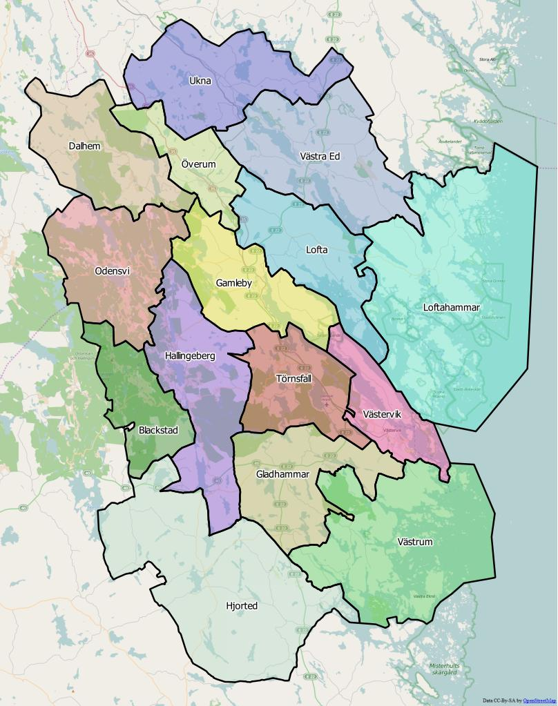 Distriktsindelningen i Västerviks kommun World file 136.3066447563250847 0 0 -136.3066447563250847 1774927.0602824876550585 8001065.12921618856489658